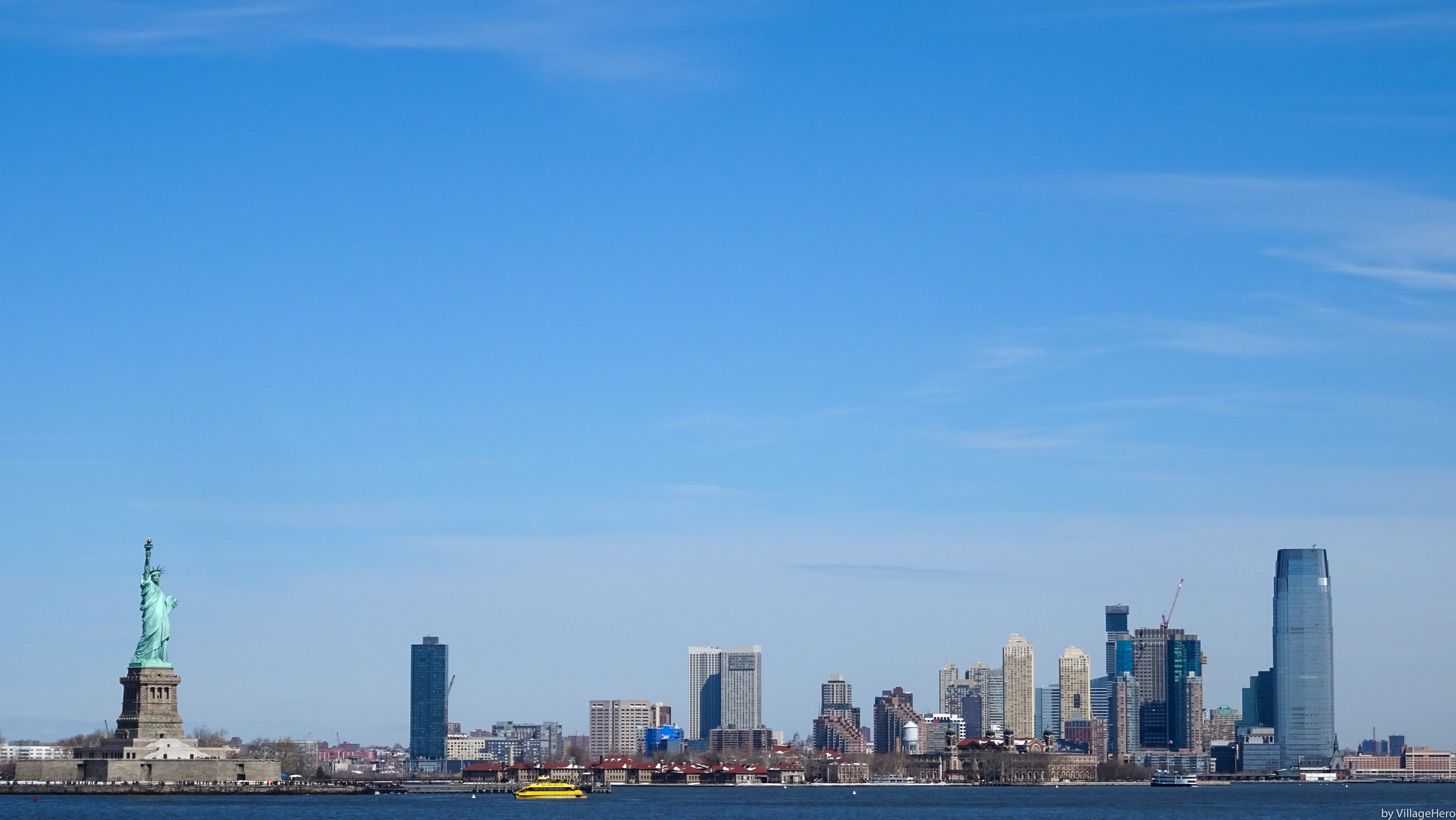 by